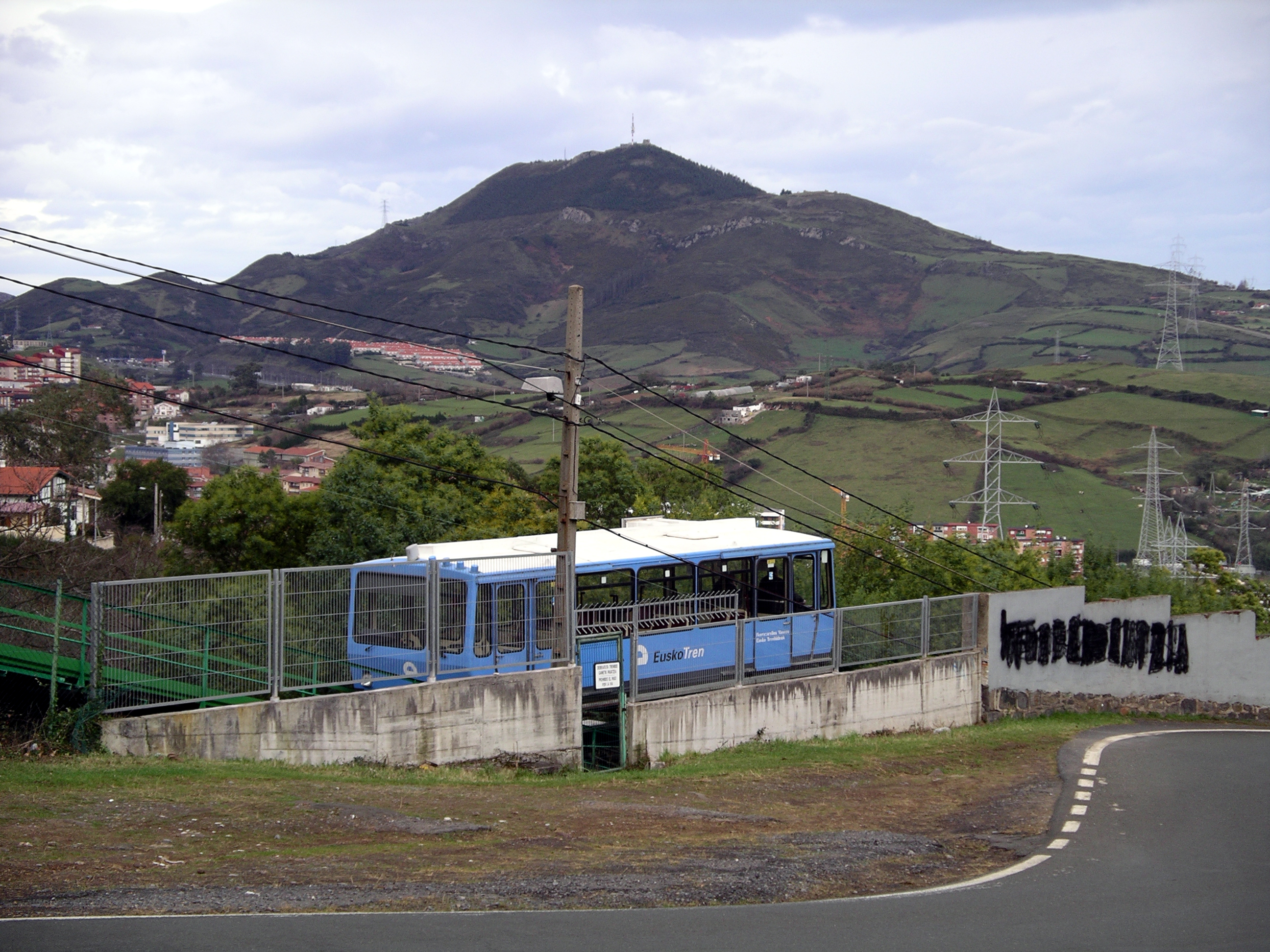 Funicular de Larreineta, en Valle de Trápaga (Bizkaia), al fondo el monte Serantes.